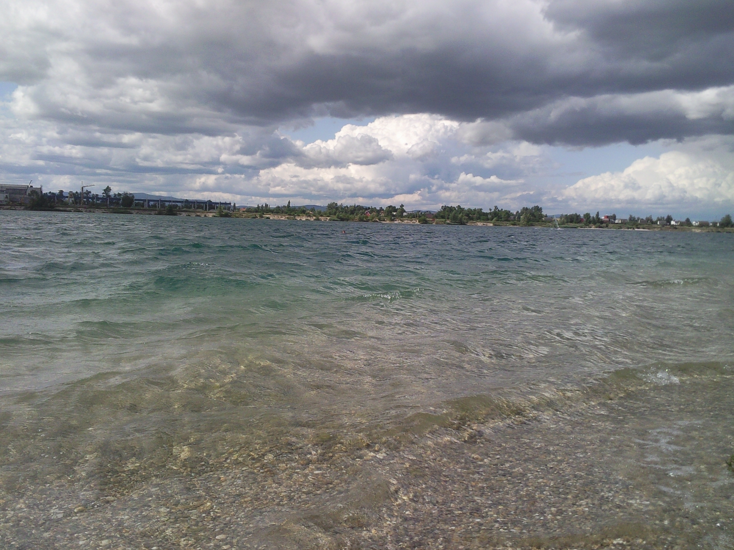 Guláška lake, Senec, Slovakia